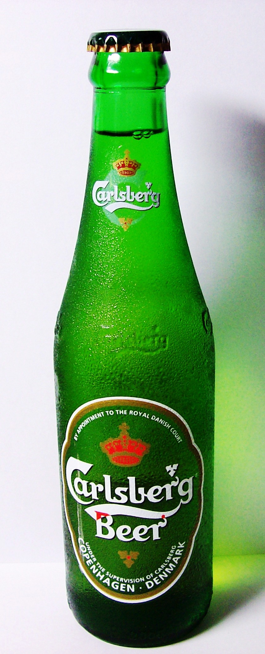 嘉士伯（Carlsberg）啤酒，产自中国广东惠州。Made in China